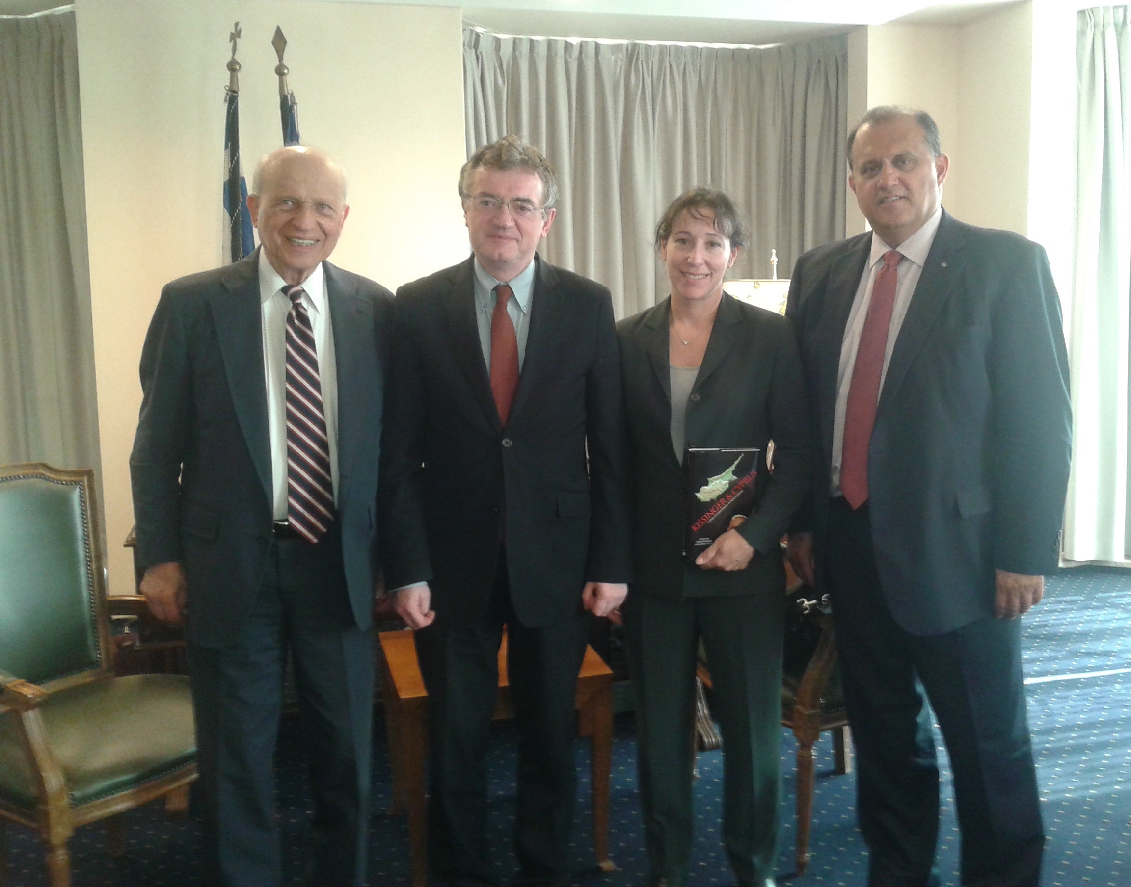 Ο Υφυπουργός Εξωτερικών, Κυριάκος Γεροντόπουλος, συναντήθηκε τη Δευτέρα 13 Οκτωβρίου 2014, με τον Ελληνοαμερικανό ιδρυτή και πρώην Πρόεδρο του Ελληνοαμερικανικού Ινστιτούτου (American Hellenic Institute/AHI), κ. Ευγένιο Ρωσσίδη και τον κ. Νικ Λαρυγγάκης, Πρόεδρο και Διευθύνων Σύμβουλο του Ελληνοαμερικανικού Ινστιτούτου.